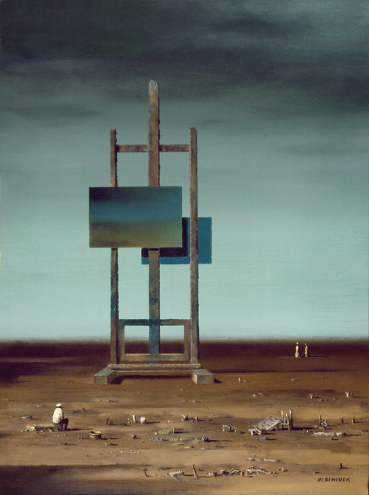 Benedek Jenő, ifjabb (Csongrád, 1939. június 13.– 2019. augusztus 20.) festőművész alkotása: A festő, 1987, olaj, 80x60 cm